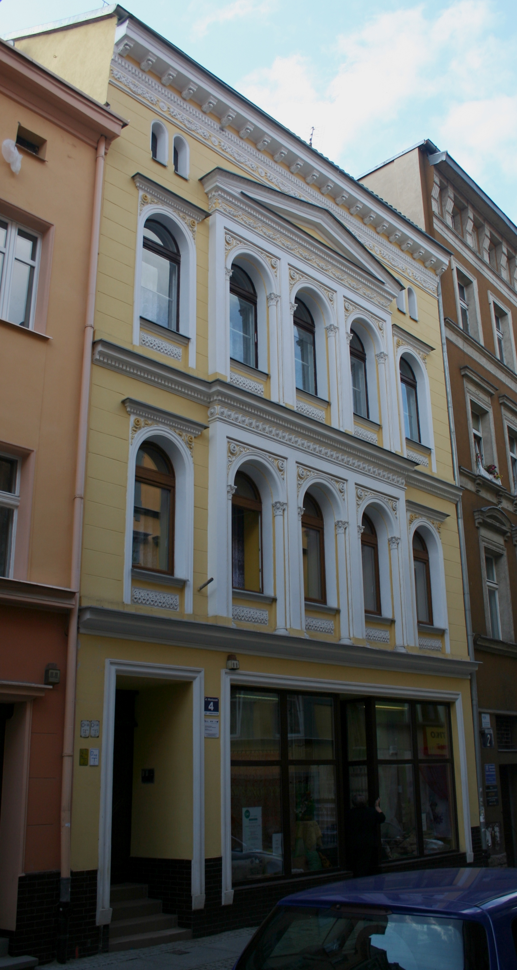 Wałbrzych, ul. Moniuszki 4 - kamienica, 1 poł. XIX, k. XIX wieku (zabytek nr 1614/WŁ z 29.01.1998)